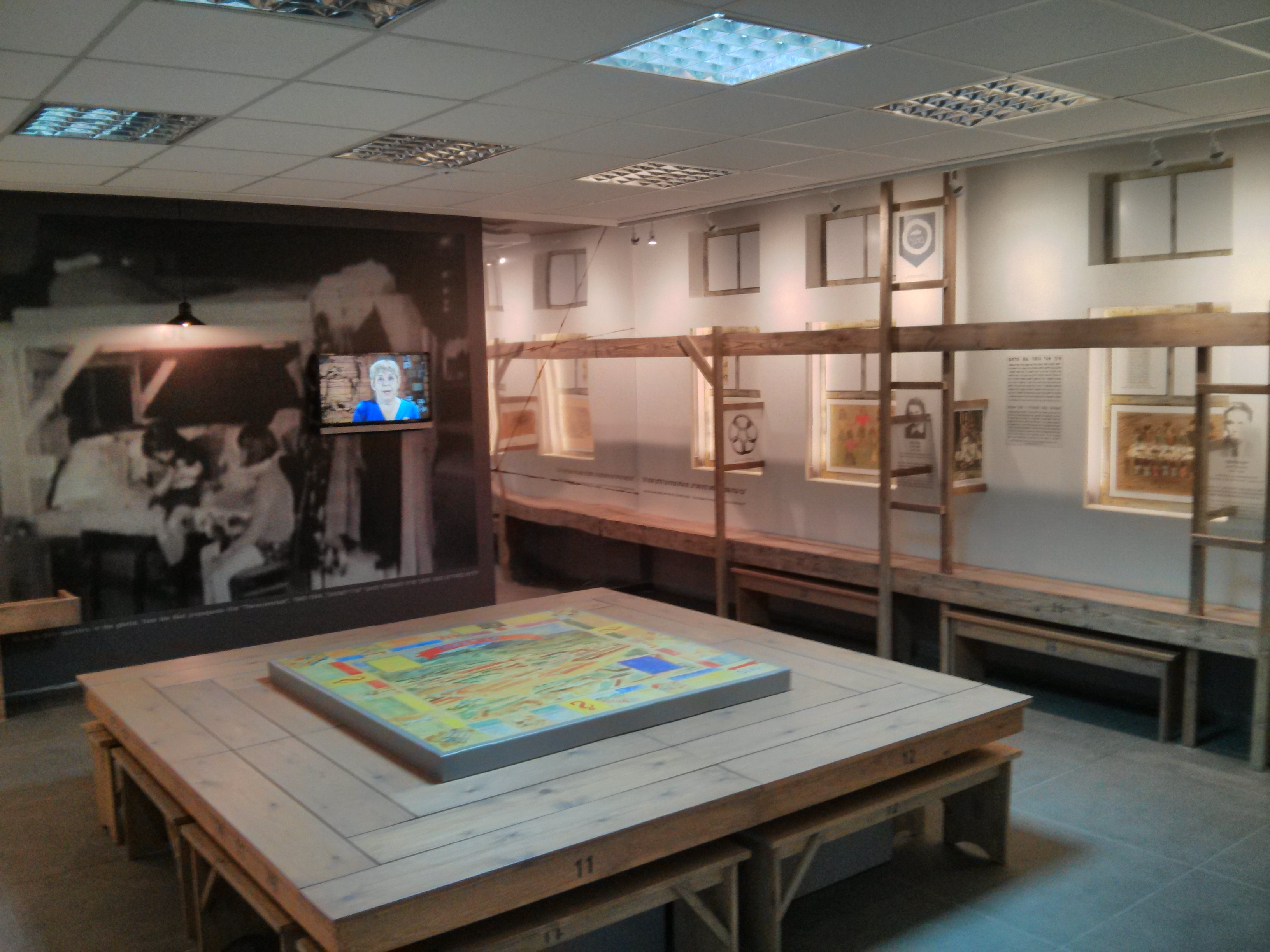 תמונה מתערוכת ילדי טרזין